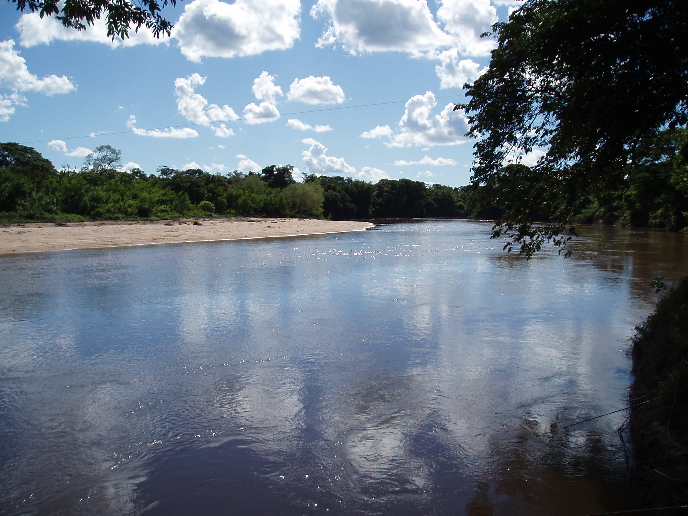 Pesqueiro do Afonsinho - Rio Apa